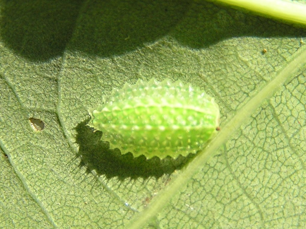 Apoda limacodes, Ślimakówka pomrowik, Brok, Polska